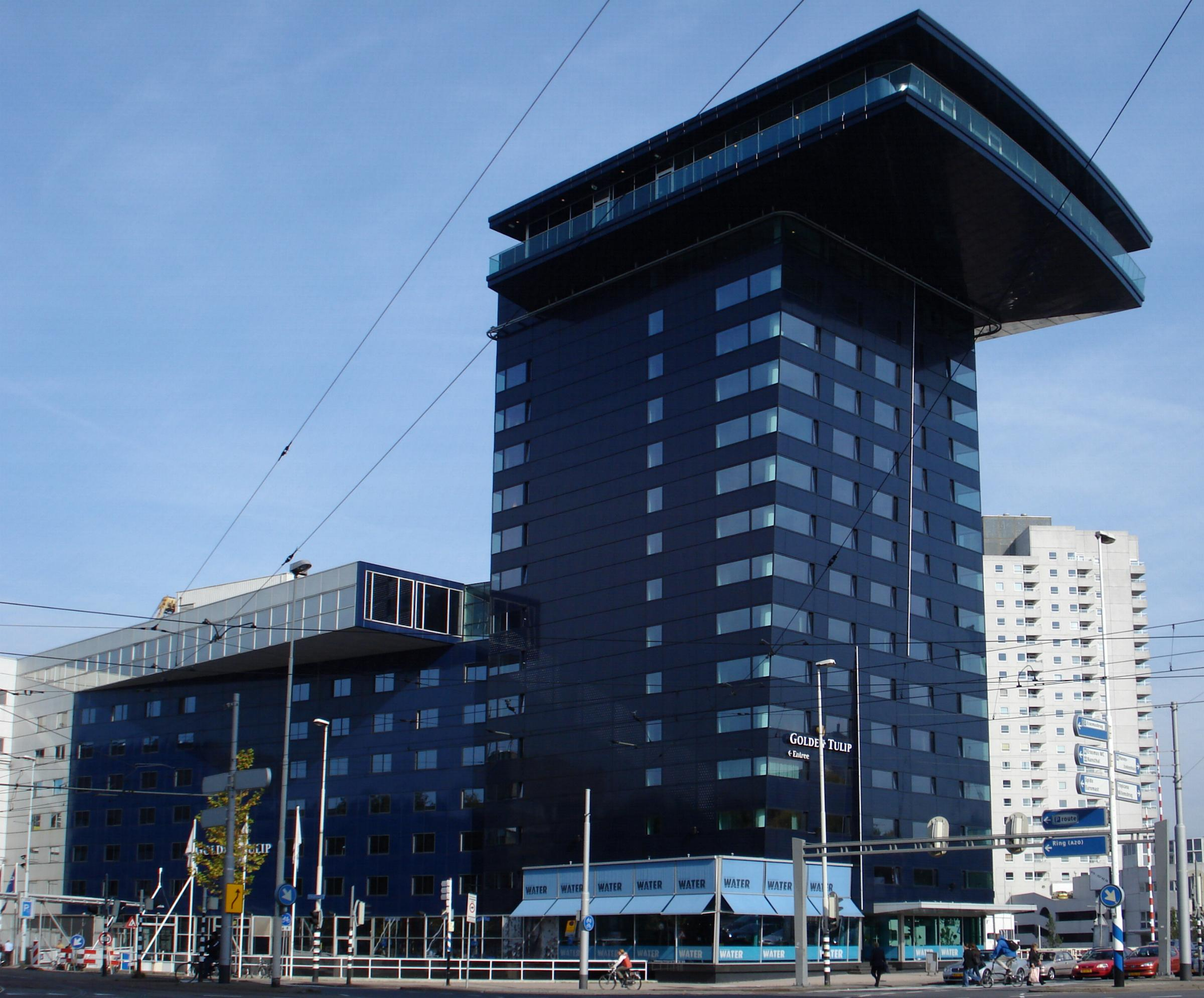 Rotterdam, Leuvehaven. Imax theater en Golden tulip hotel.